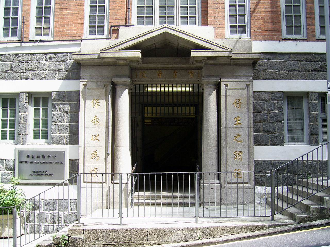 中文（香港）: 西區社區中心